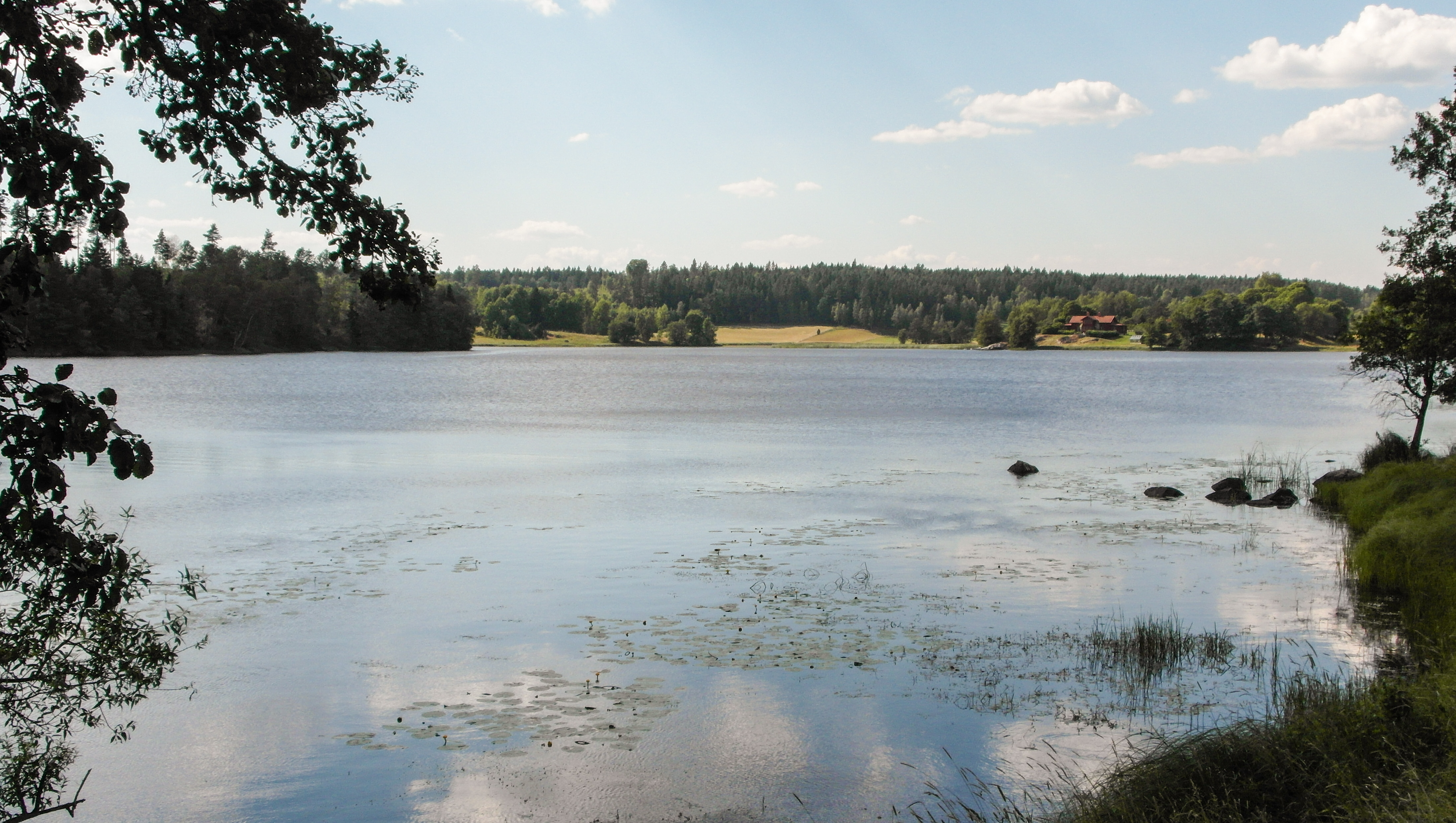 Sjön Barsättern vid Skeppsta, Gnesta Kommun, Södermanland, Sverige